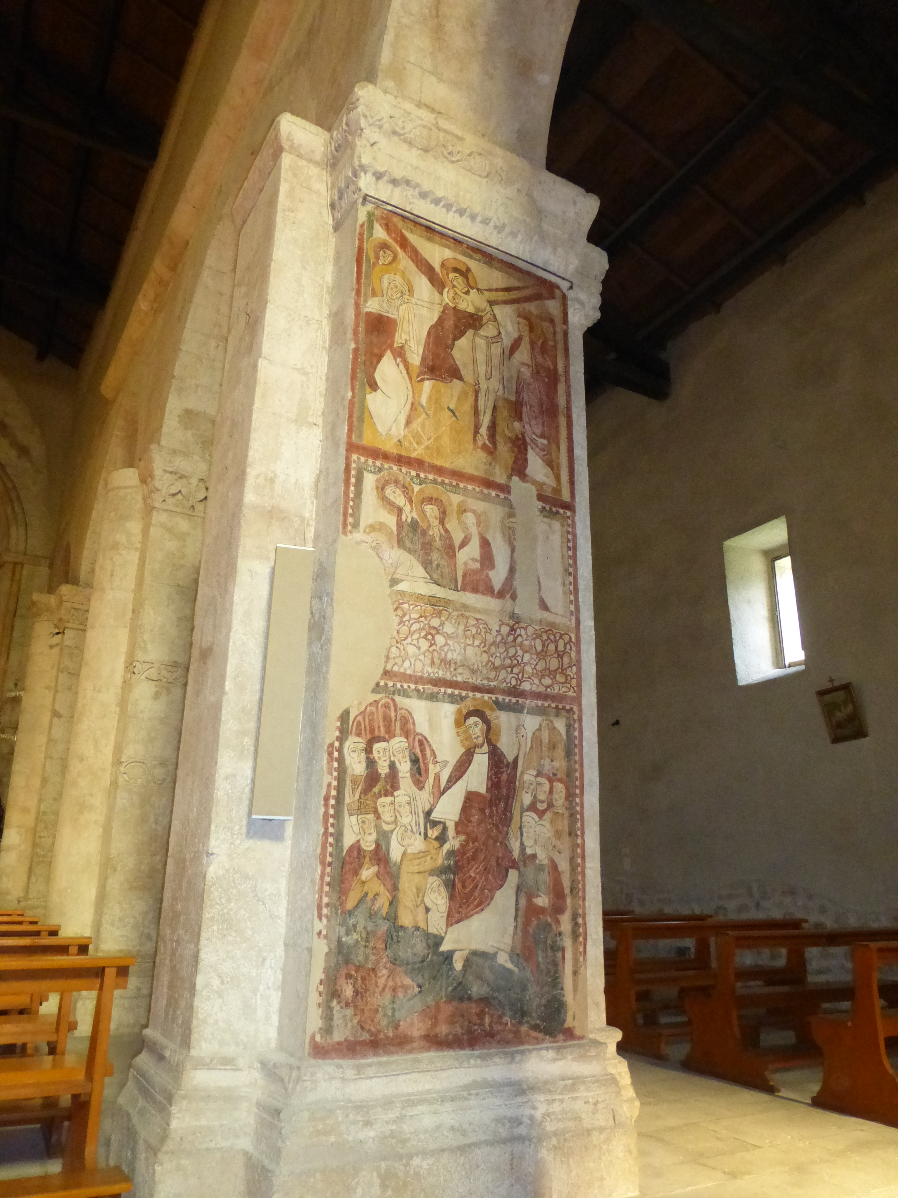 Affresco nella chiesa di San Tommaso Becket a Caramanico Terme (PE)